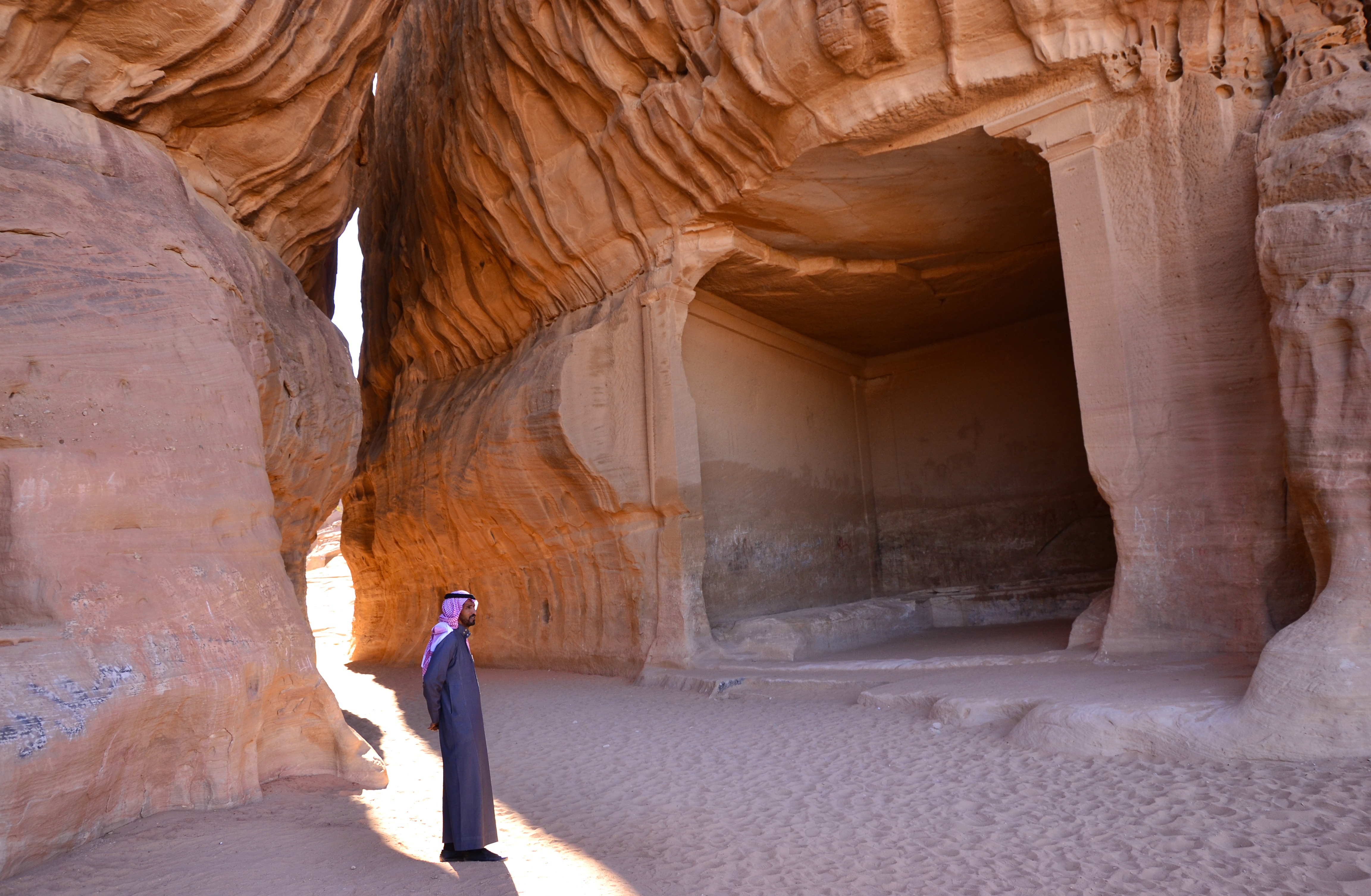 Madain Saleh منطقة الديوان ويجاوره ممر يعرف بالسيق